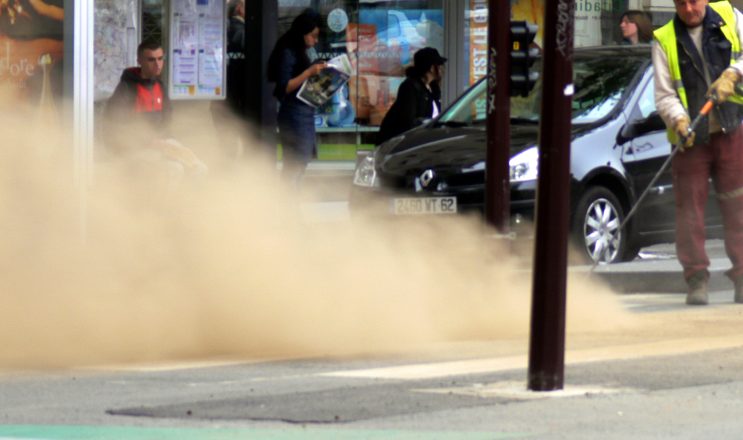 Poussière émise par la découpe de béton avec une meuleuse lors de travaux en dans le d'une grande ville. Selon les pays il est recommandé ou obligatoire de porter un masque FFP2 ou FFP3 pour se protéger les poumons. Ici l'utilisation d'air comprimé pour nettoyer le chantier expulse la poussière (source de pollution de l'air). Il aurait été possible de l'aspirer la poussière ou de mouiller le trait de coupe..